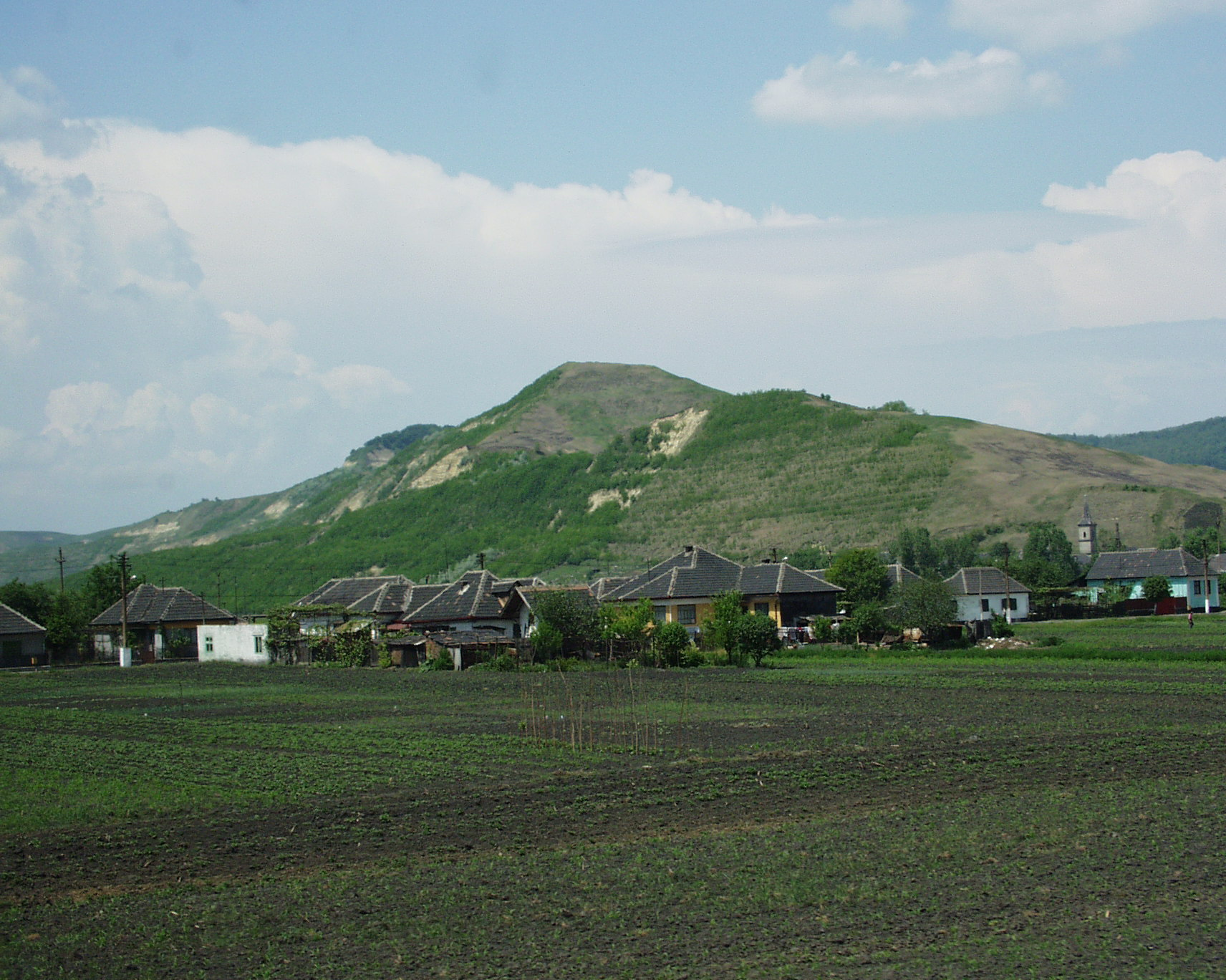 Blick über Copşa Mică